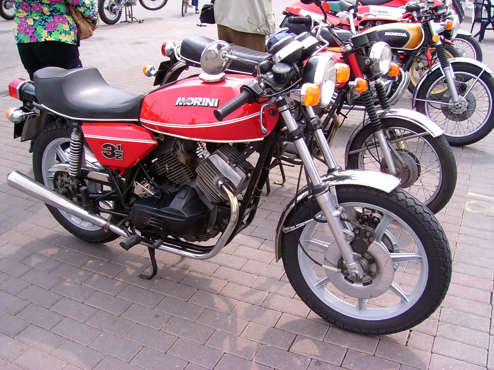 Foto scattata a Leinì per la festa del primo Maggio Leinì - Torino